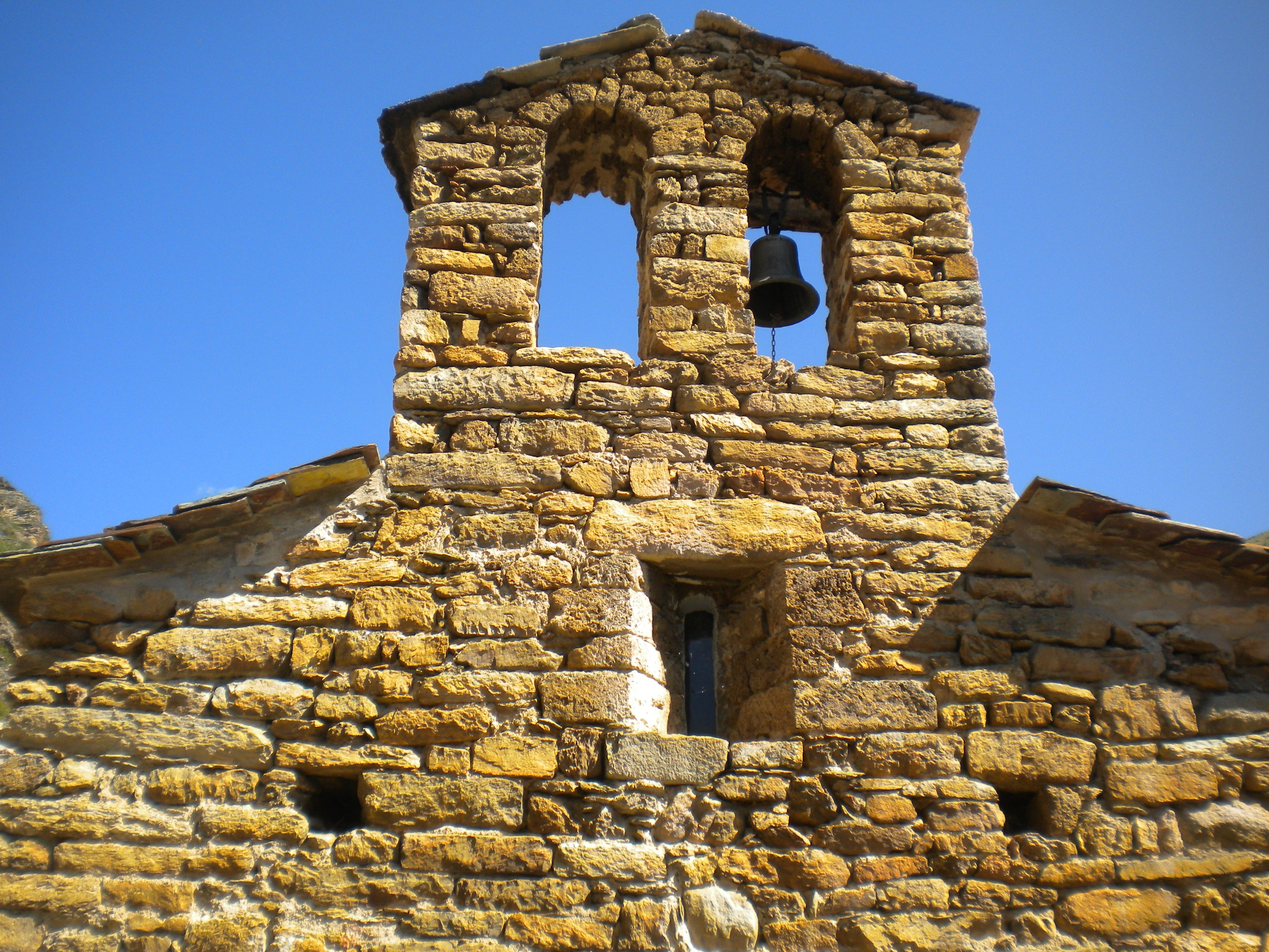 Campanar d'espadanya de dos ulls de l'església de Sant Climent d'Iran, al municipi del Pont de Suert, a l'Alta Ribagorça.